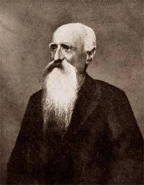 Ritratto di Roberto Ardigò